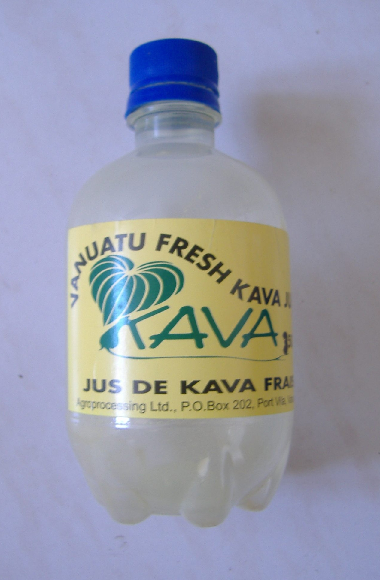 Kava frais (dit vert) commercialisé à Port Vila. Bouteille de 350ml, l'équivalent d'un grand shell. Fresh Kava (aka green kava) sold in Port Vila. Bottle contains 350ml of juice, wich approximativly equal to one big shell.